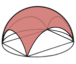 Schematische Darstellung Hängekuppel. Eigene Zeichnung. Public Domain